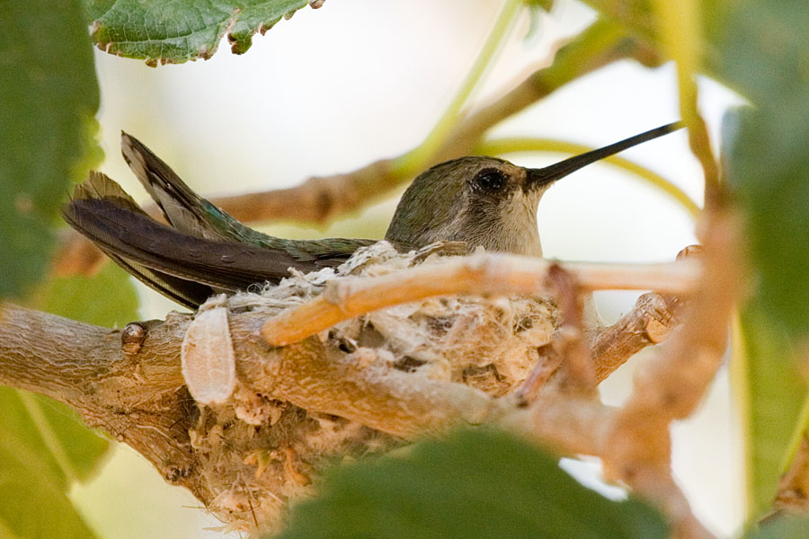 Nesting Anna's Hummingbird